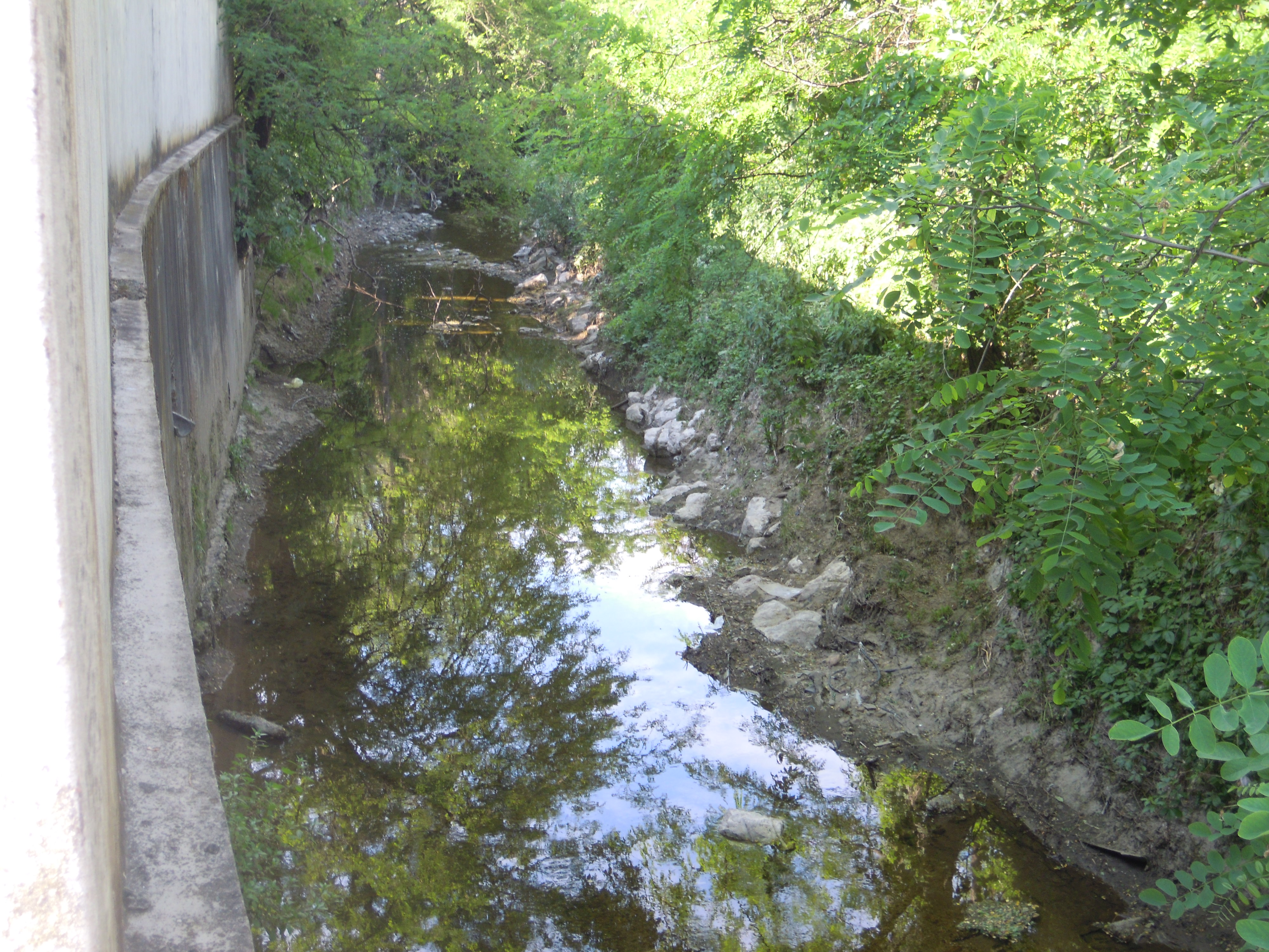 Vista del torrente Arno a Samarate (VA) dalla via San Protaso